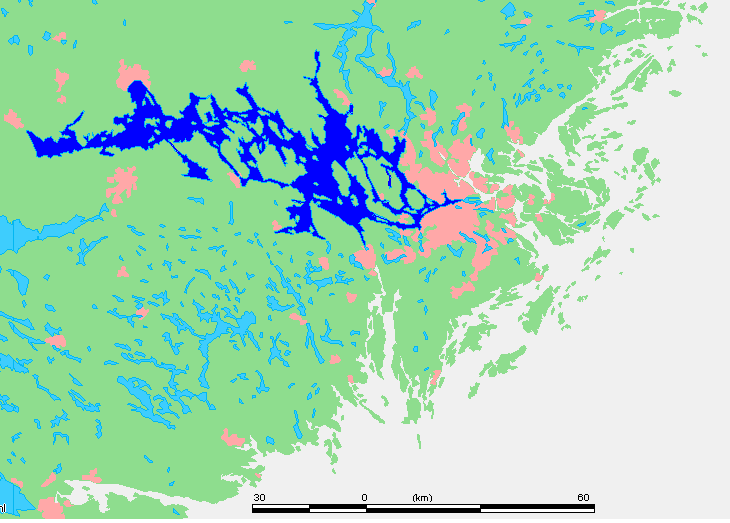 lake: Mälaren